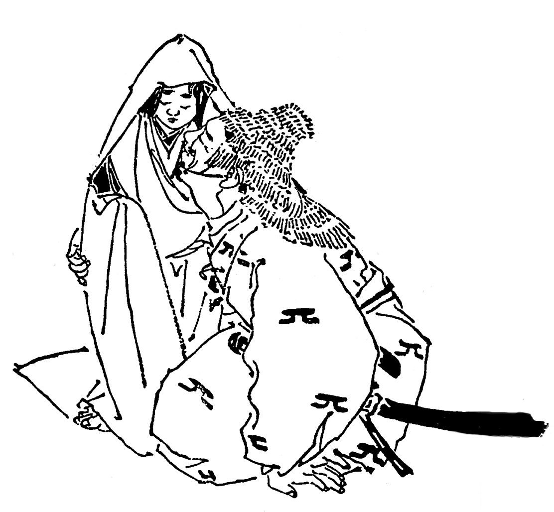 後藤実基。平治の乱で坊門姫を匿う。平安時代末期 - 鎌倉時代初期の武将。／江戸時代『前賢故実』より。画：菊池容斎